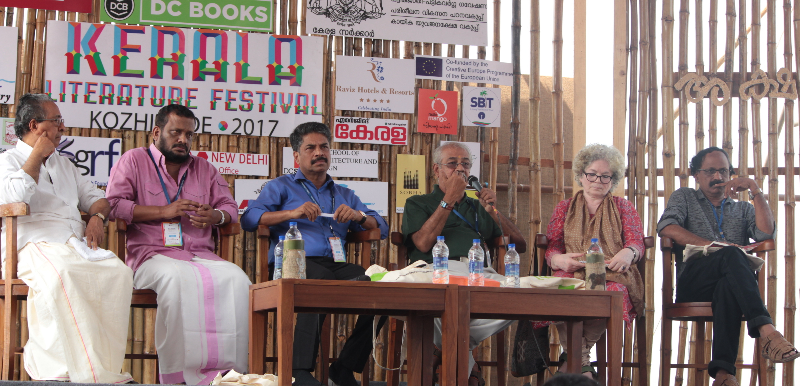 എം.എംബഷീര്‍, വി.ആര്‍ സുധീഷ്, ആഷാമേനോന്‍, സാറാജോസഫ്, അംബികാസുതന്‍ മാങ്ങാട് എന്നിവര്‍ കോഴിക്കോട് ലിറ്ററേച്ചര്‍ ഫെസ്റ്റിവലില്‍ പരിസ്ഥിതിയും കഥാഭാവനയും എന്ന വിഷയത്തില്‍ ചര്‍ച്ചനടത്തുന്നു.